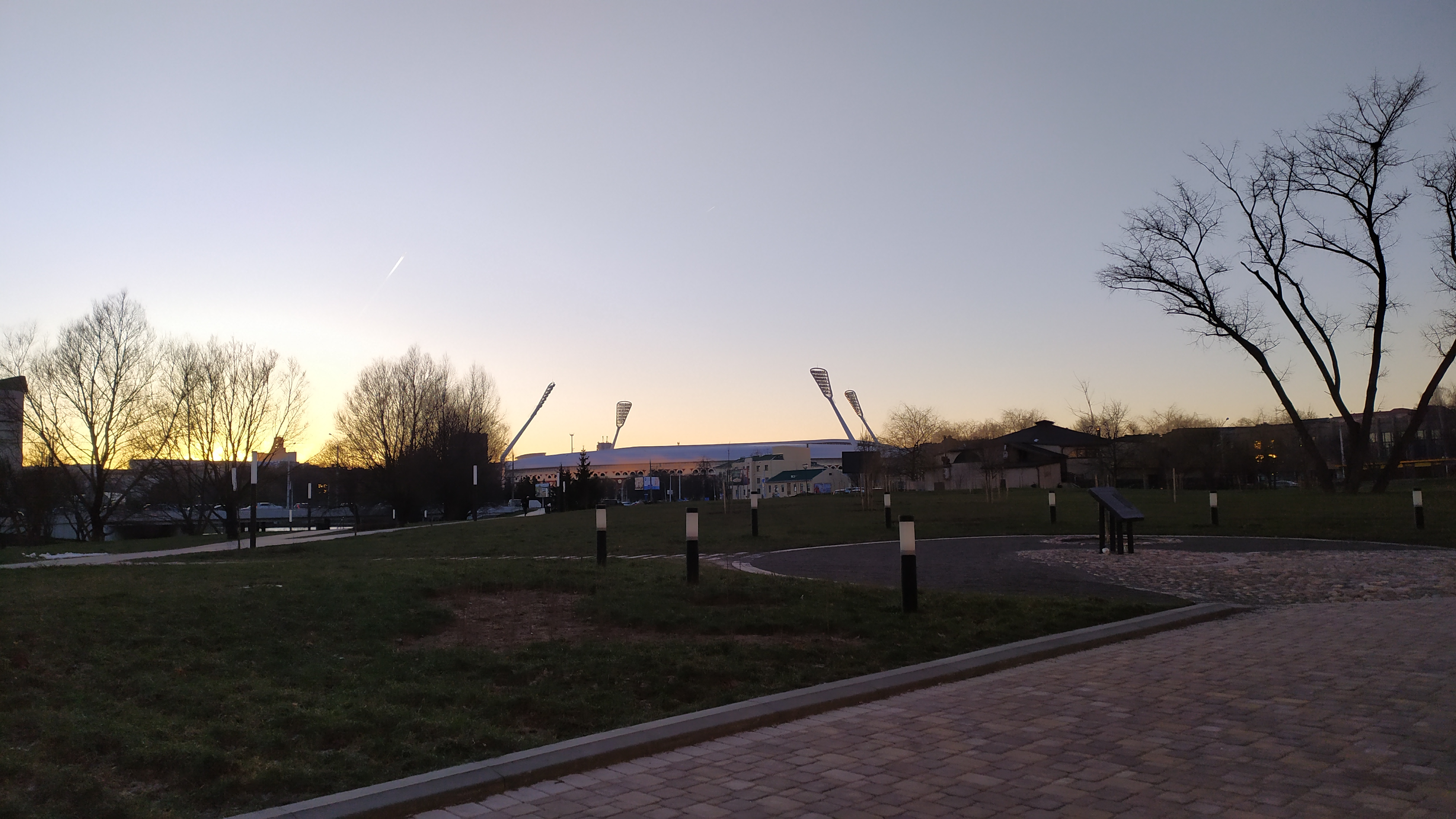 Кашарскае прадмесце ў Менску, 2020 год.